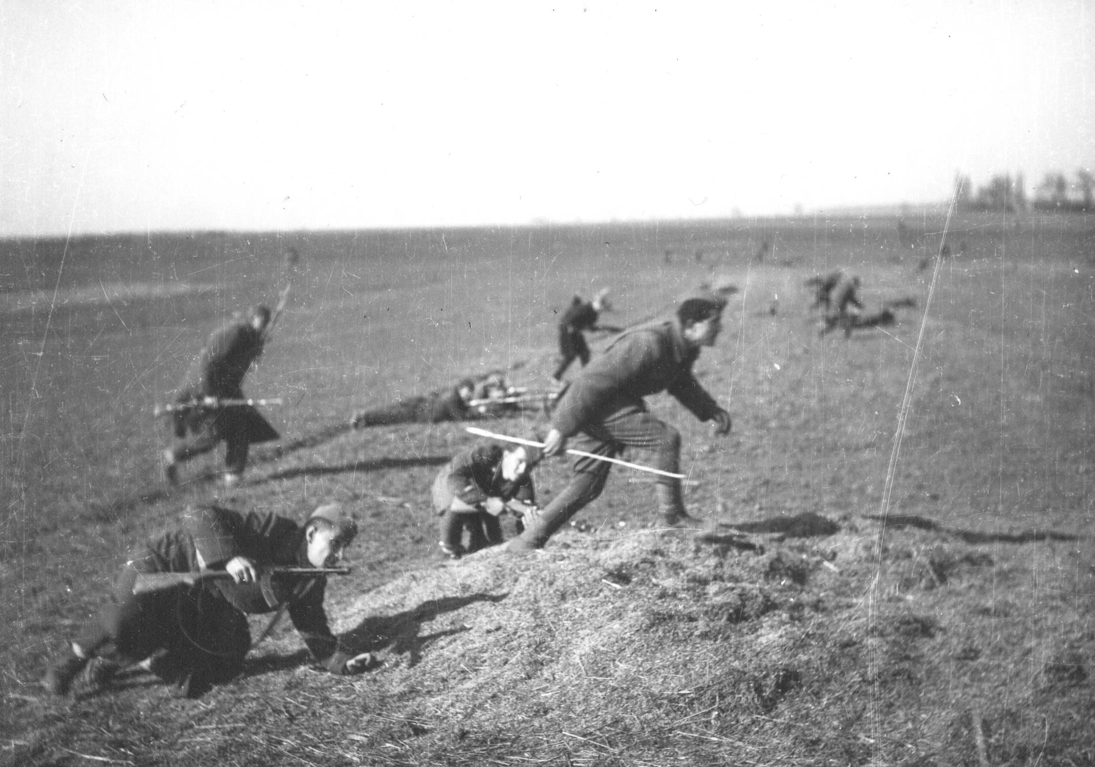 Srpskohrvatski / српскохрватски: Juriš boraca 21.divizije pri proboju Sremskog fronta, 12. aprila 1945.godine.